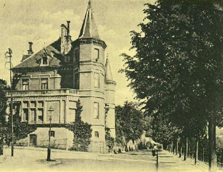 Luxembourg, Villa Gillardin (vers 1900) occupé par l'Ambassade de France